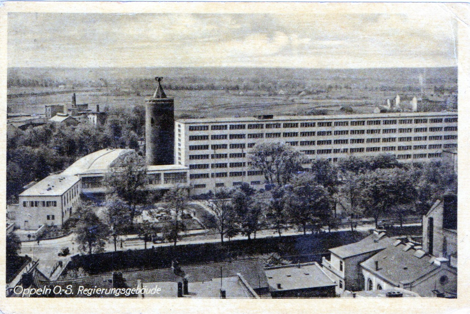 Das Regierungsgebäude in Oppeln 1930er Jahr